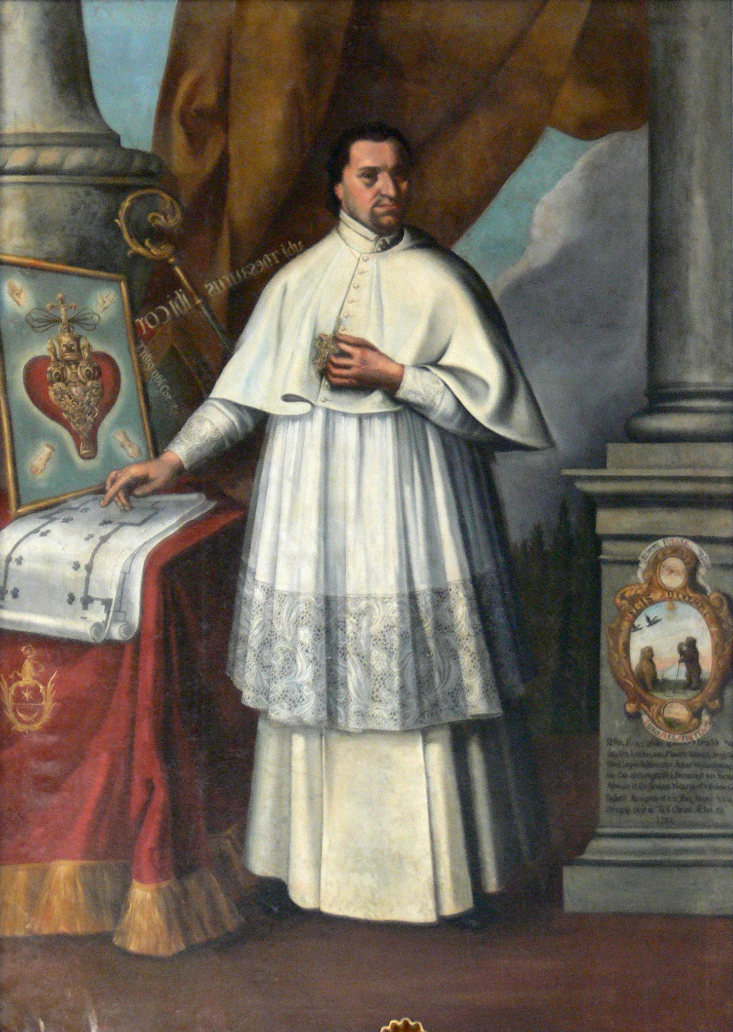 Weißenau, ehem. Klosterkirche, Chor, Gemälde Abt Leopold Mauch